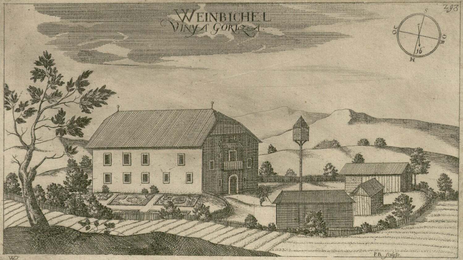 Gradič Vina Gorica